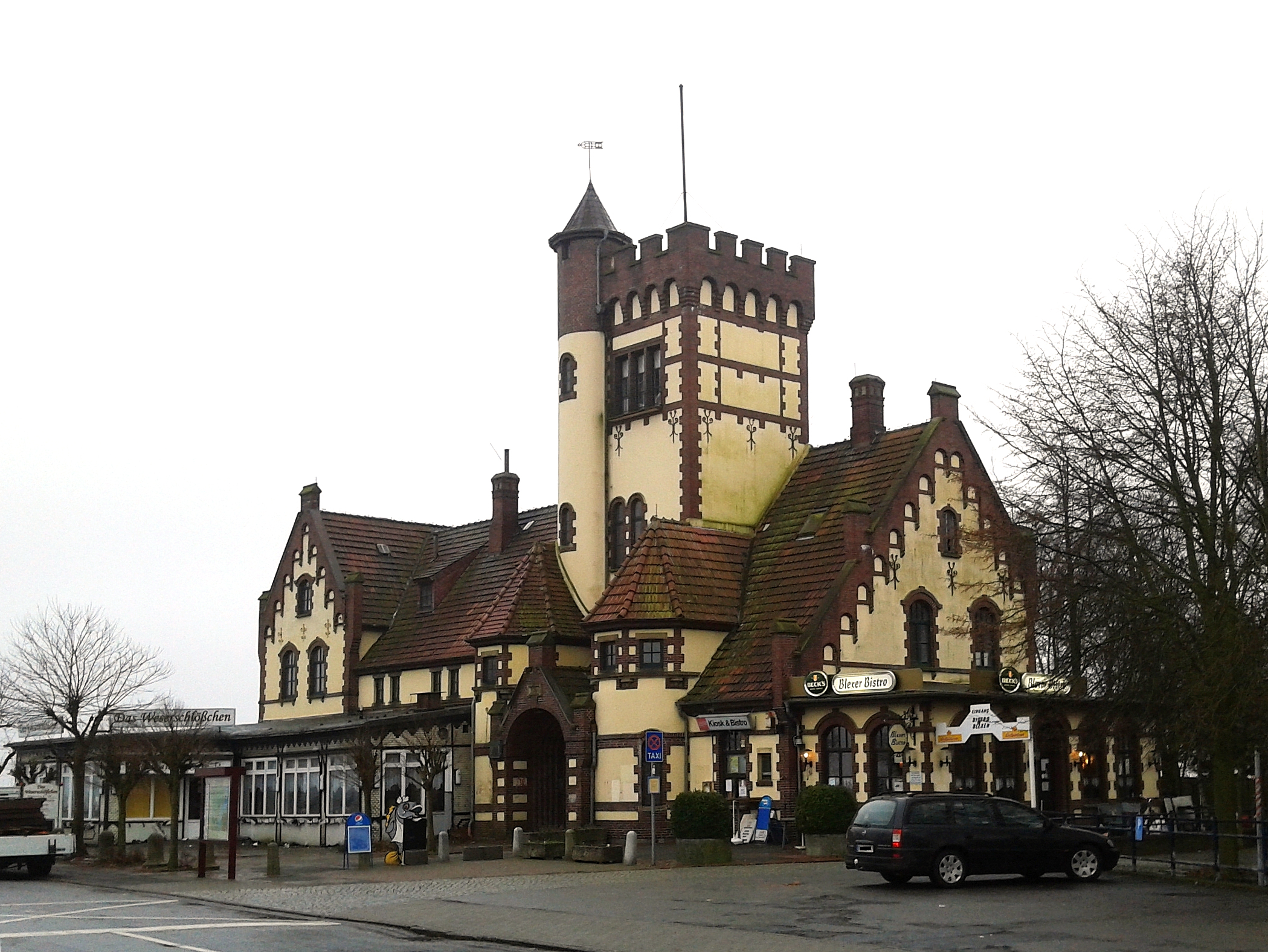 Ehemaliges Bahnhofs-Empfangsgebäude in Blexen, Niedersachsen, Deutschland; erbaut 1908, unter Denkmalaschutz; umgenutzt zum Hotel "Das Weserschlößchen"